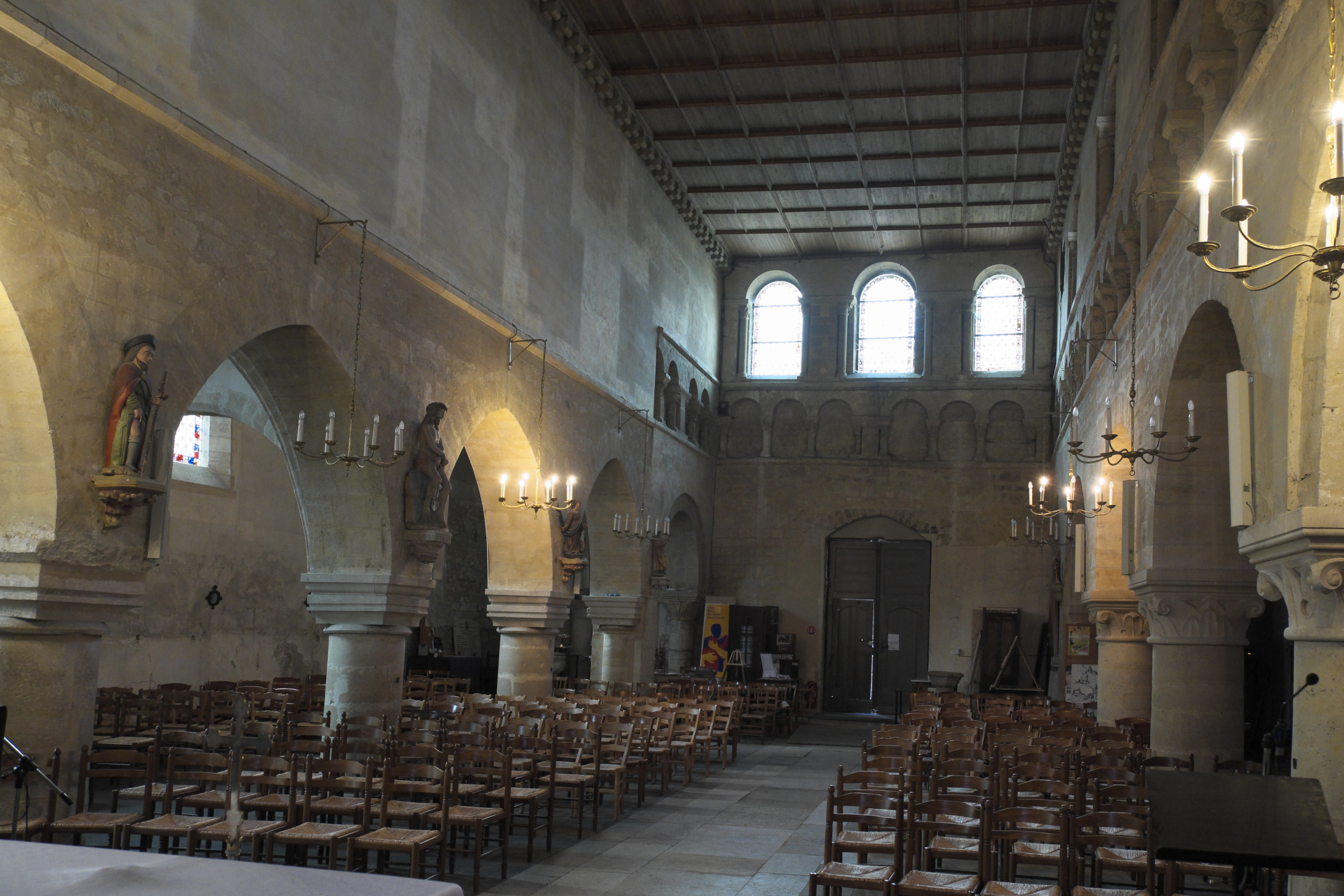 Katholische Kirche Saint-Nicolas in Maule im Département Yvelines (Île-de-France/Frankreich), Innenraum